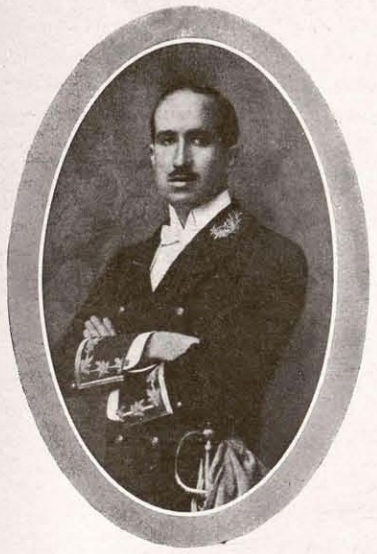 Marqués de Quintanar, por Franzen.